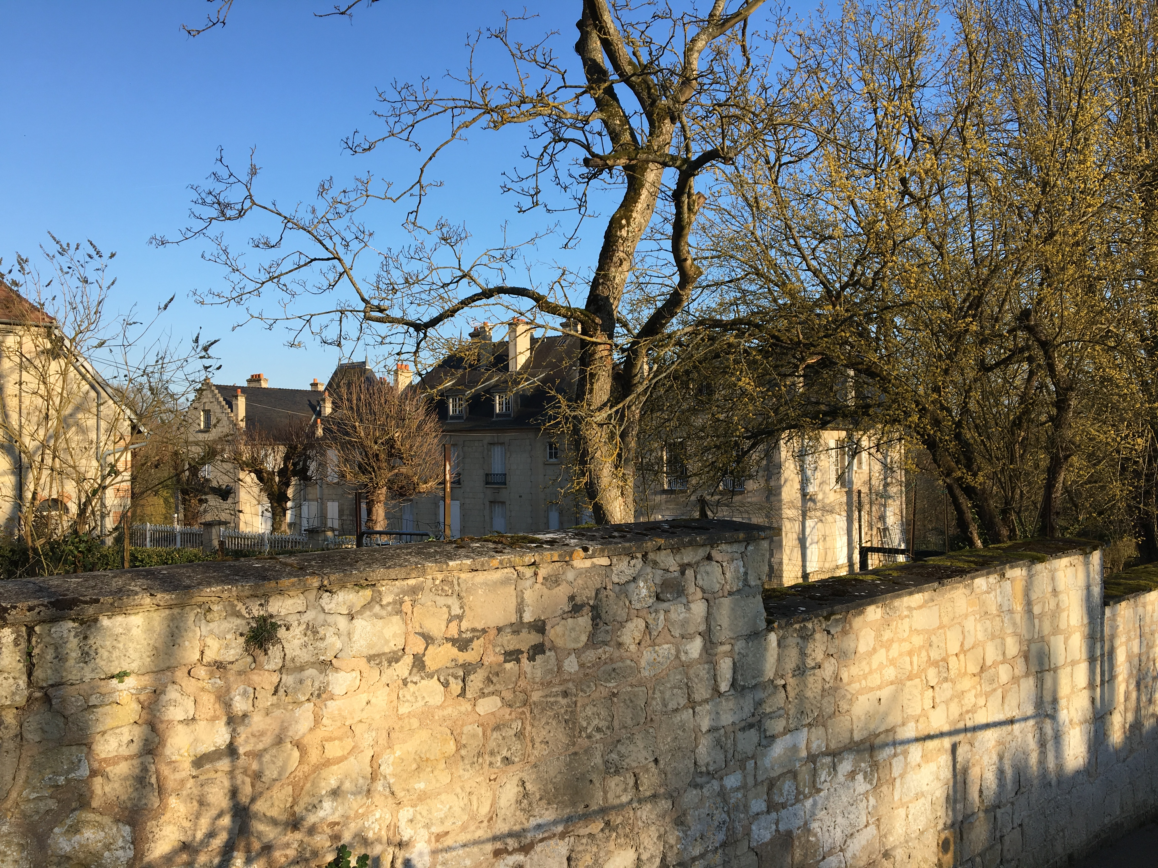 Château du Fief Champêtre, Fontenoy, Aisne